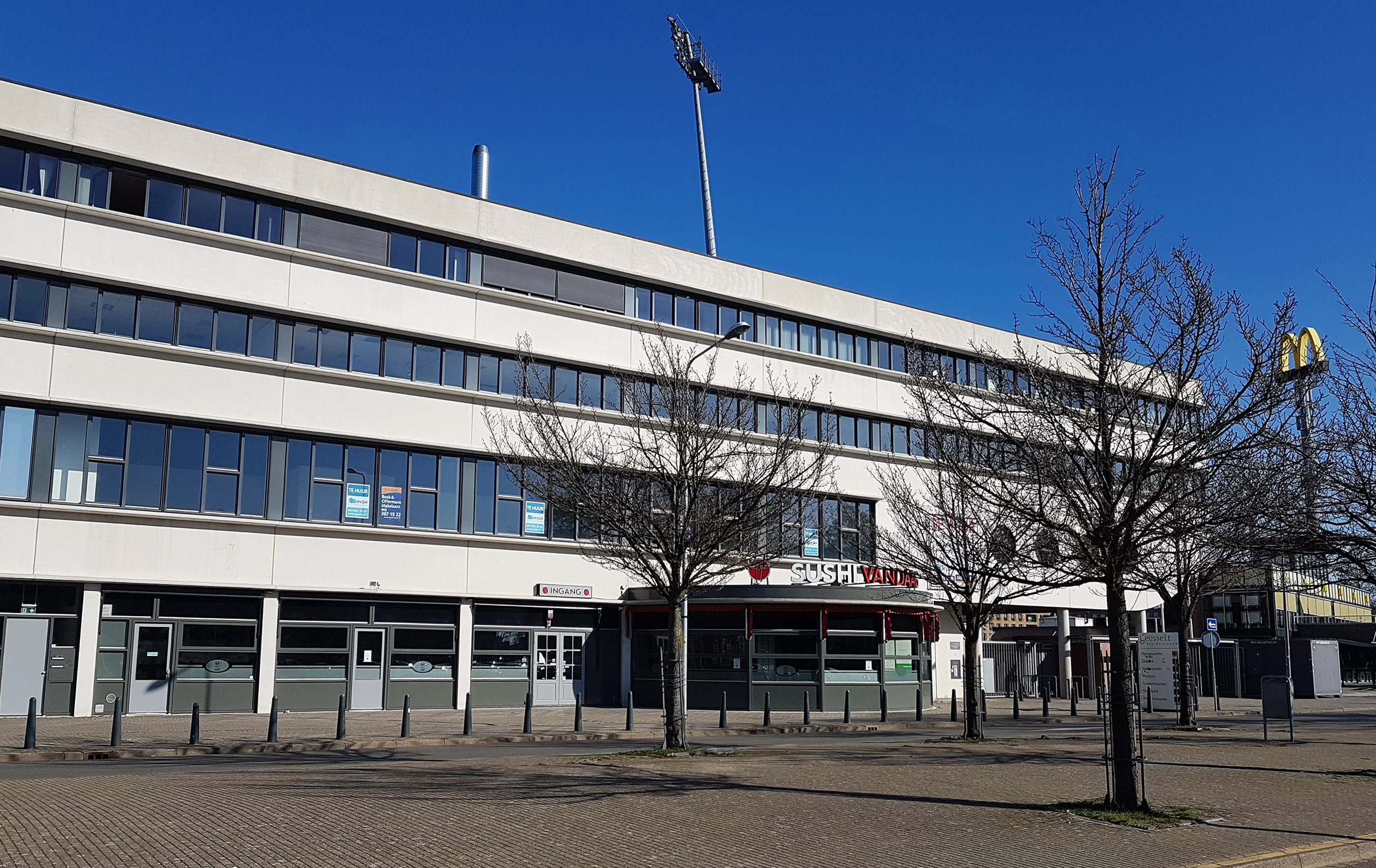 Zicht uit het westen op het Geusseltstadion in het Geusseltpark in Maastricht-Oost.